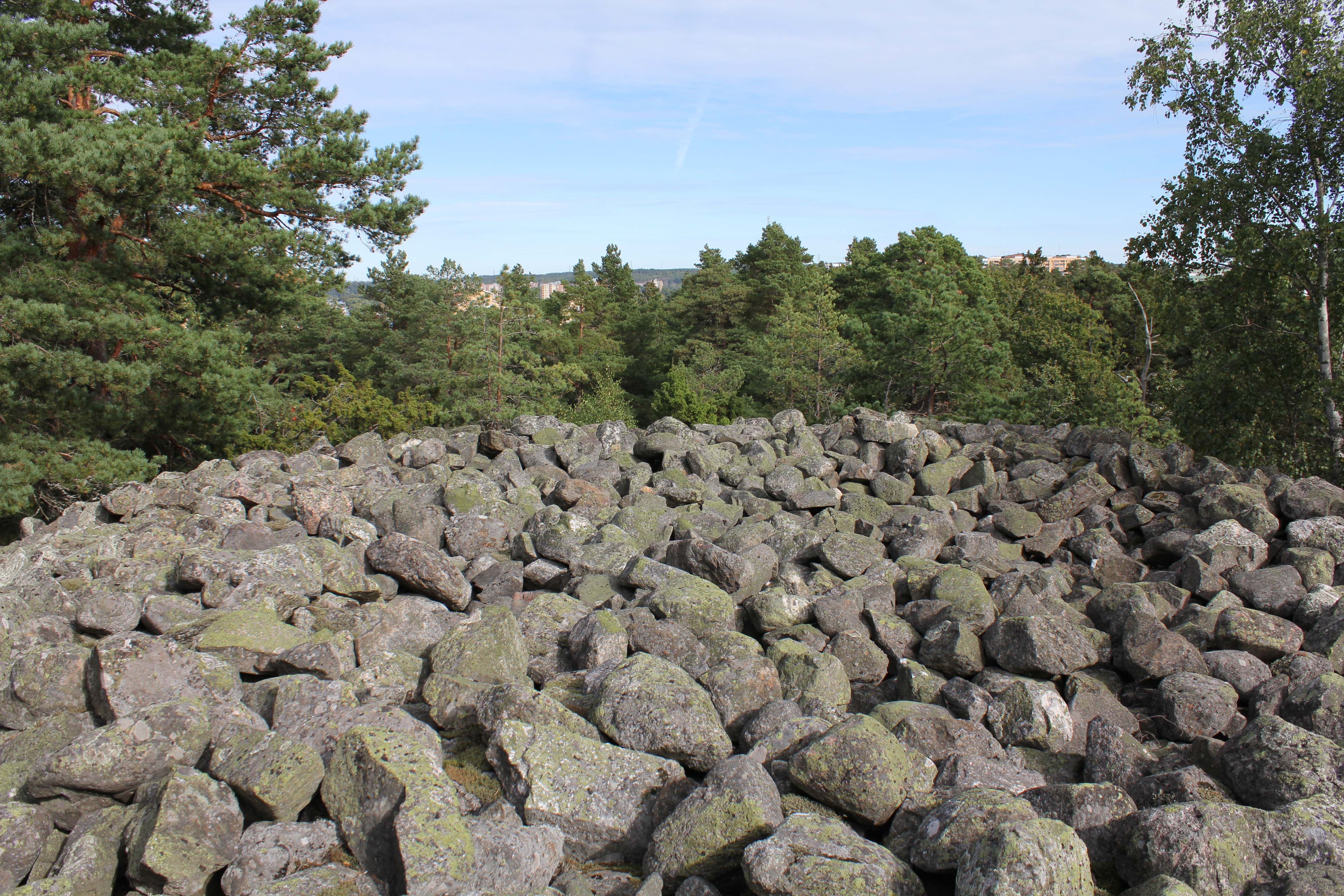 Röse på Eriksbergsåsen i Hallunda, Botkyrka.